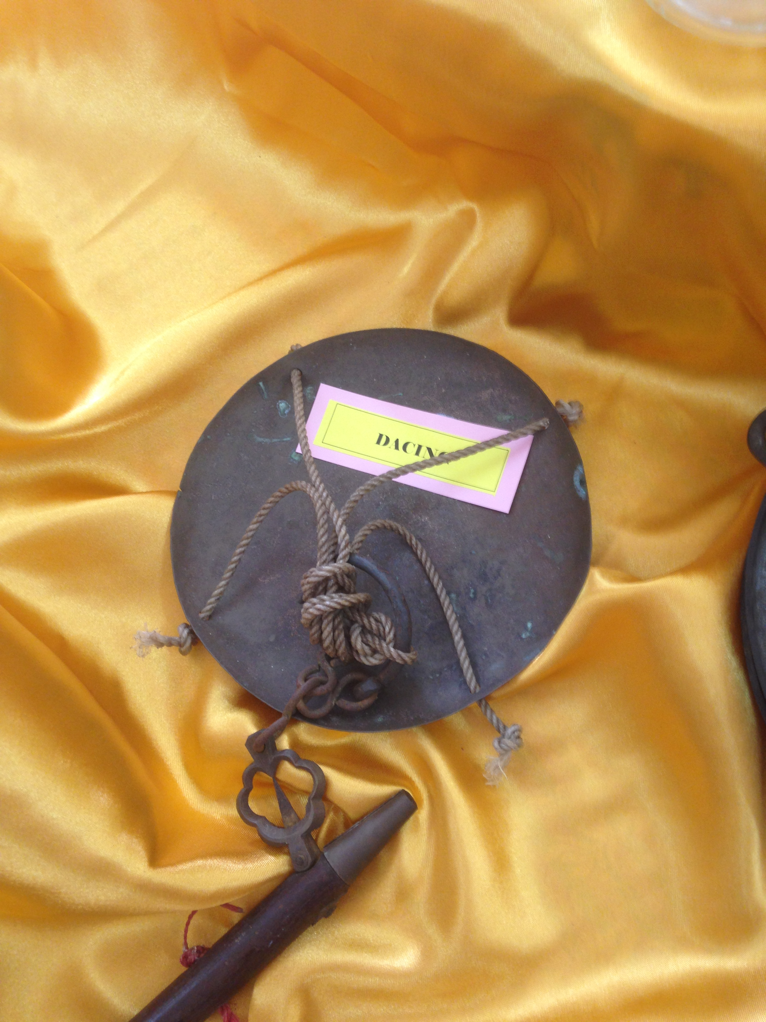 DANCING